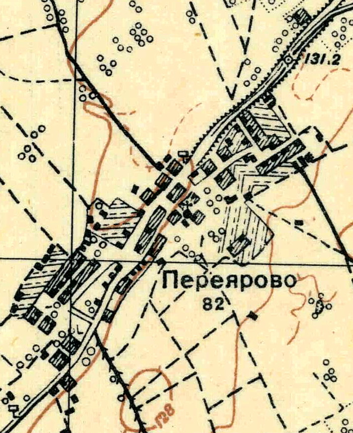 Топографическая карта Ленинградской области, квадрат О-35-24-Б-а (Переярово), деревня Переярово